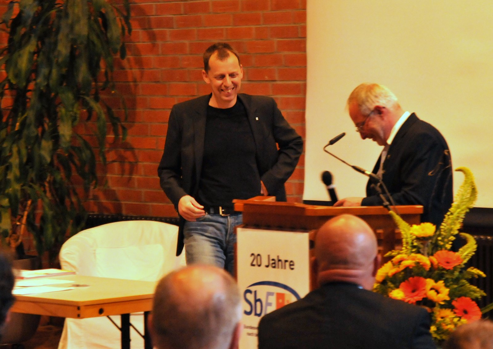 Ingo Vogl (*1970), beim Festvortrag 20 Jahre SbE in Witten an an der Ruhr.